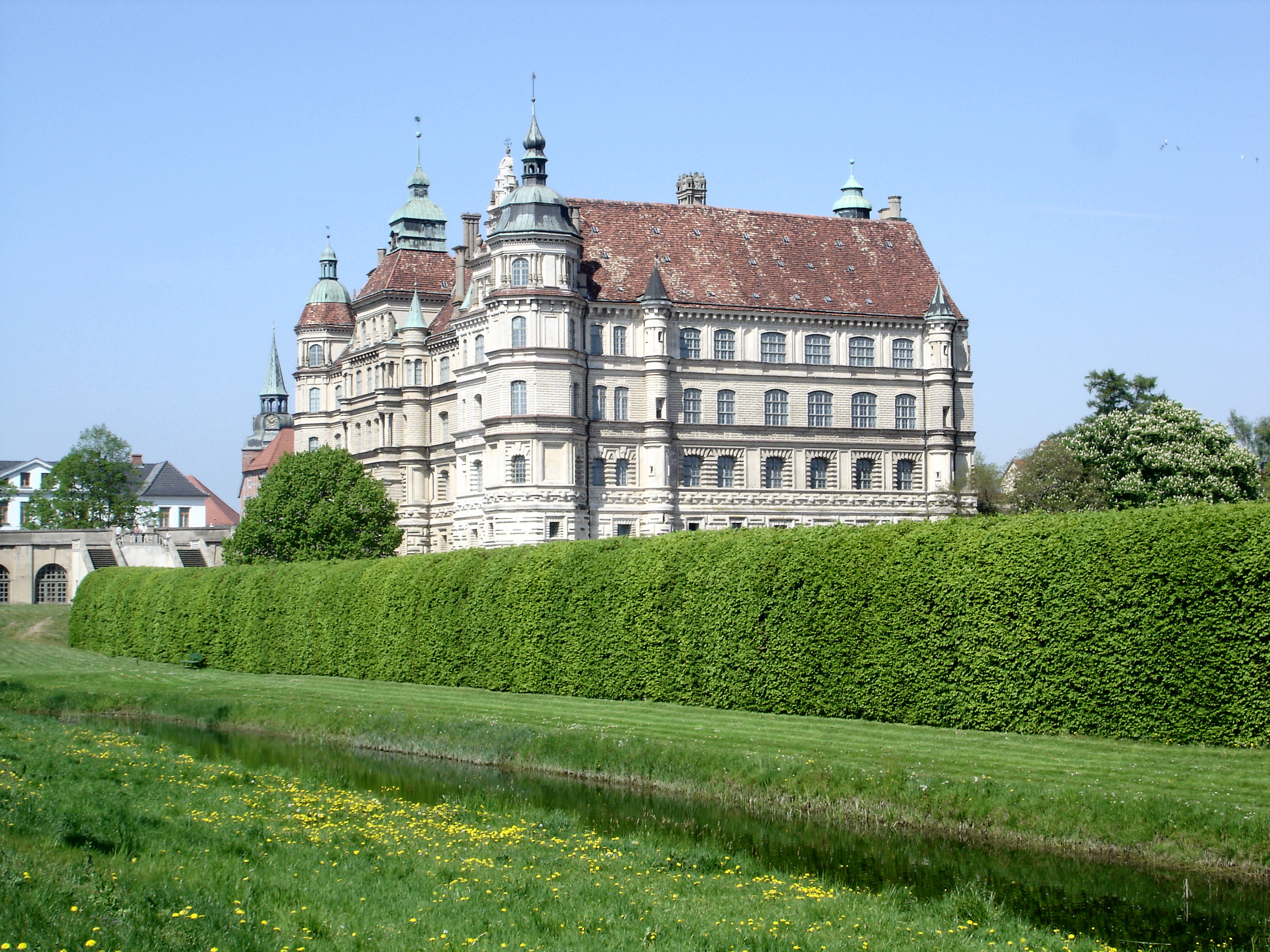 Schloss Güstrow / castle in Güstrow